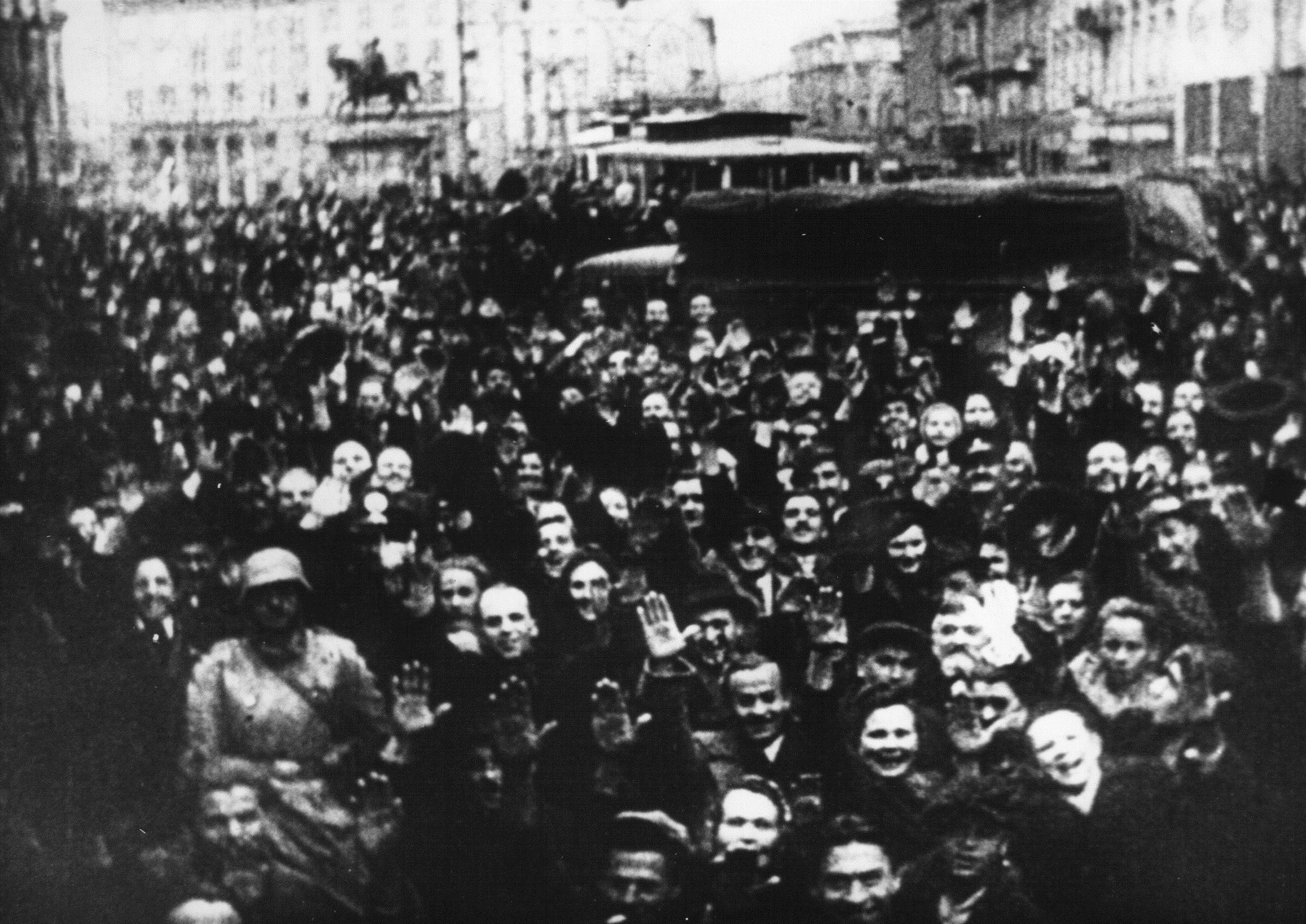 Sprejem nemške vojske v Zagrebu.